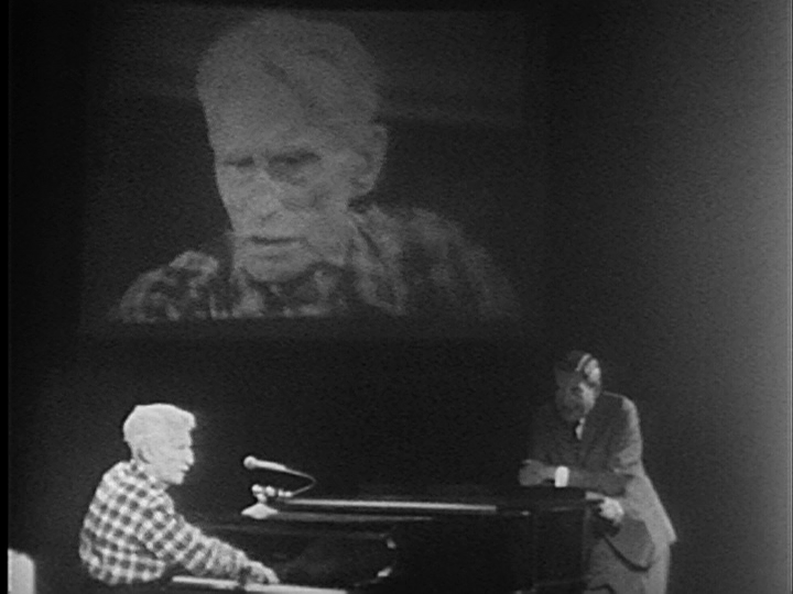 Henry de Monfreid en 1967 au Sel de la Semaine, émission télévisée hebdomadaire animée par Fernand Séguin (Radio-Canada, Montréal). On le voit ici s'accompagnant au piano en chantant une chanson de marins. Monfreid avait alors 88 ans.